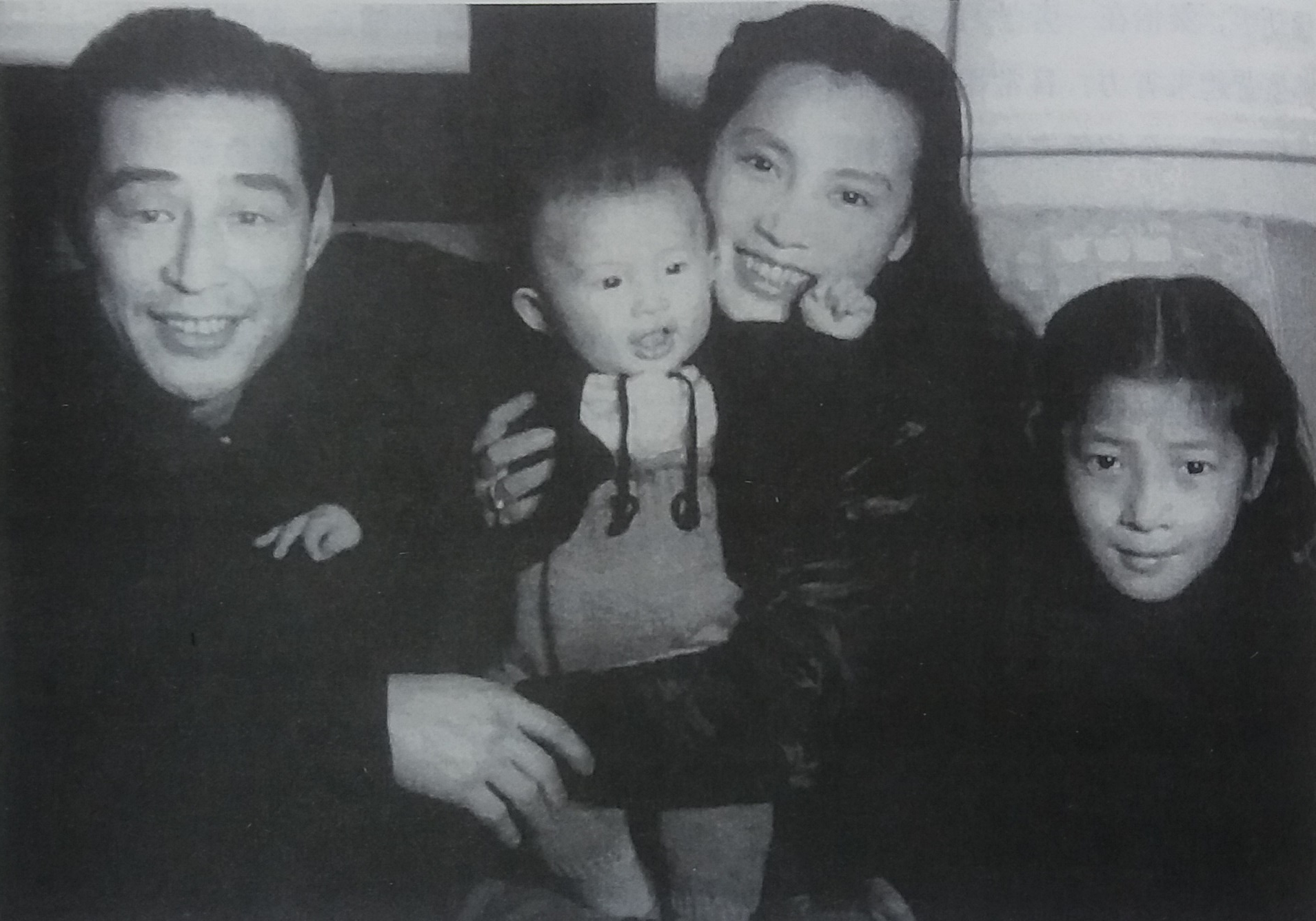 金焰秦怡全家福1948年冬